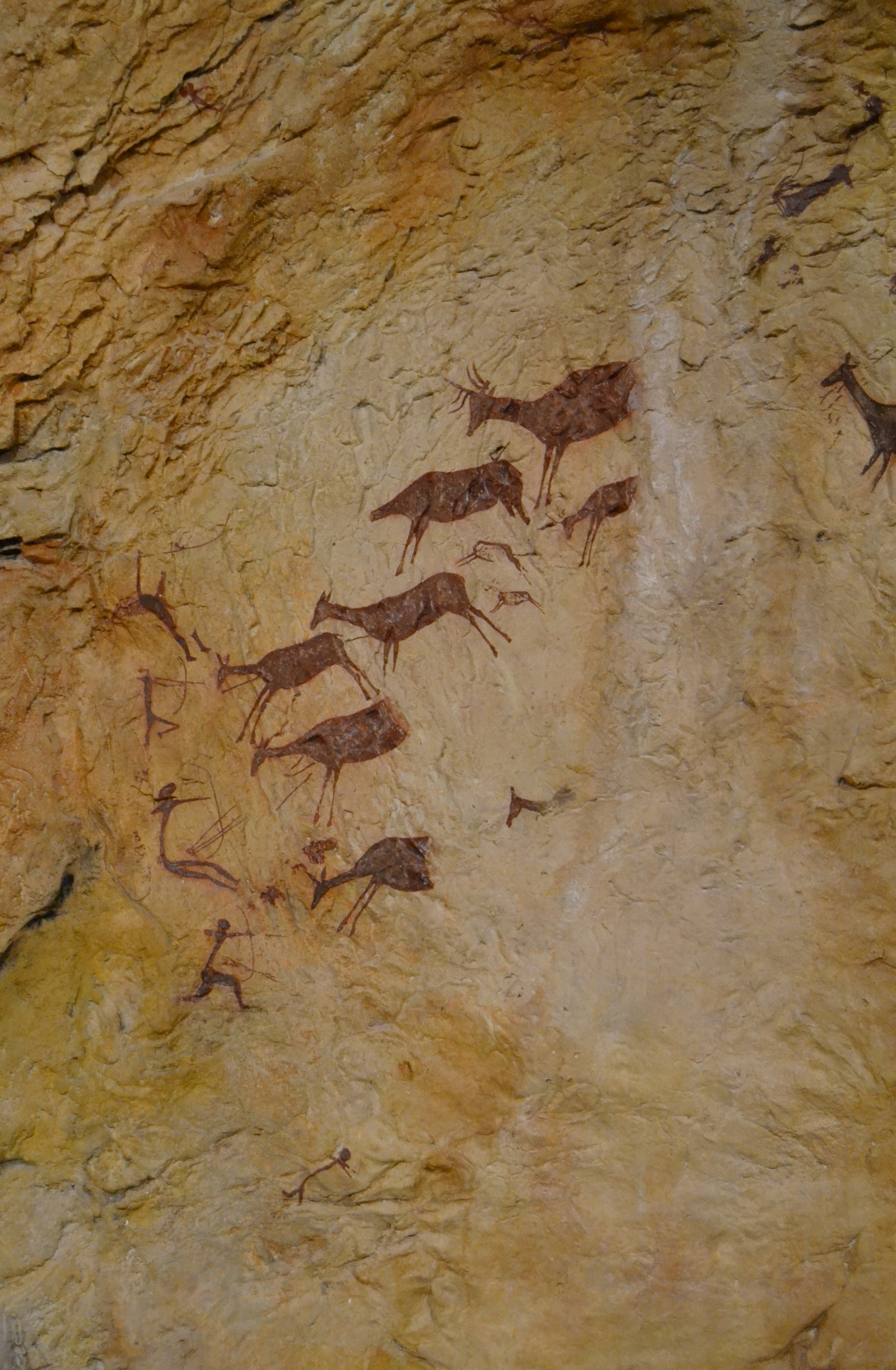 Escena de caça de la cova dels Cavalls, reproducció del museu de la Valltorta.